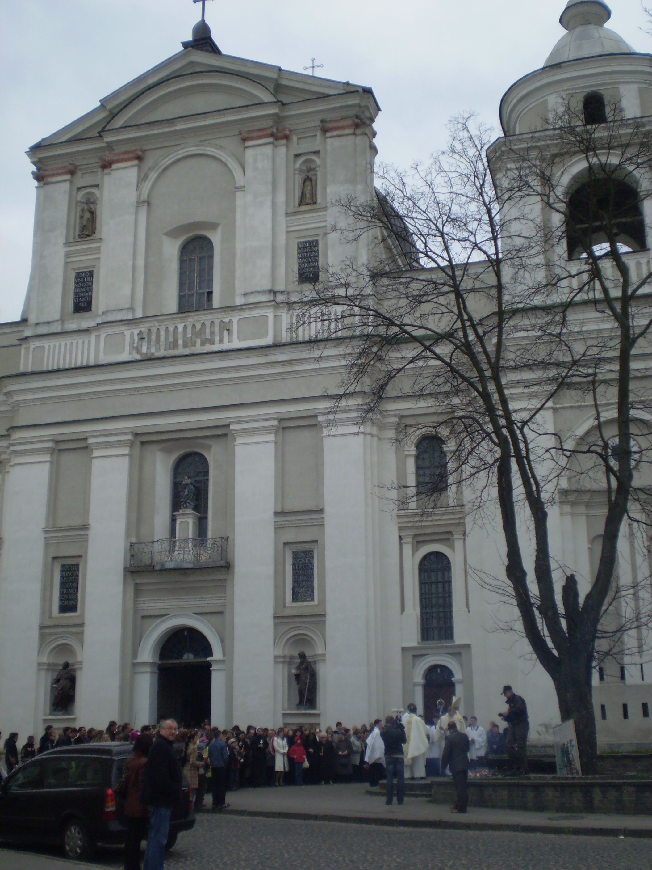 Katholische Kirche in Luzk